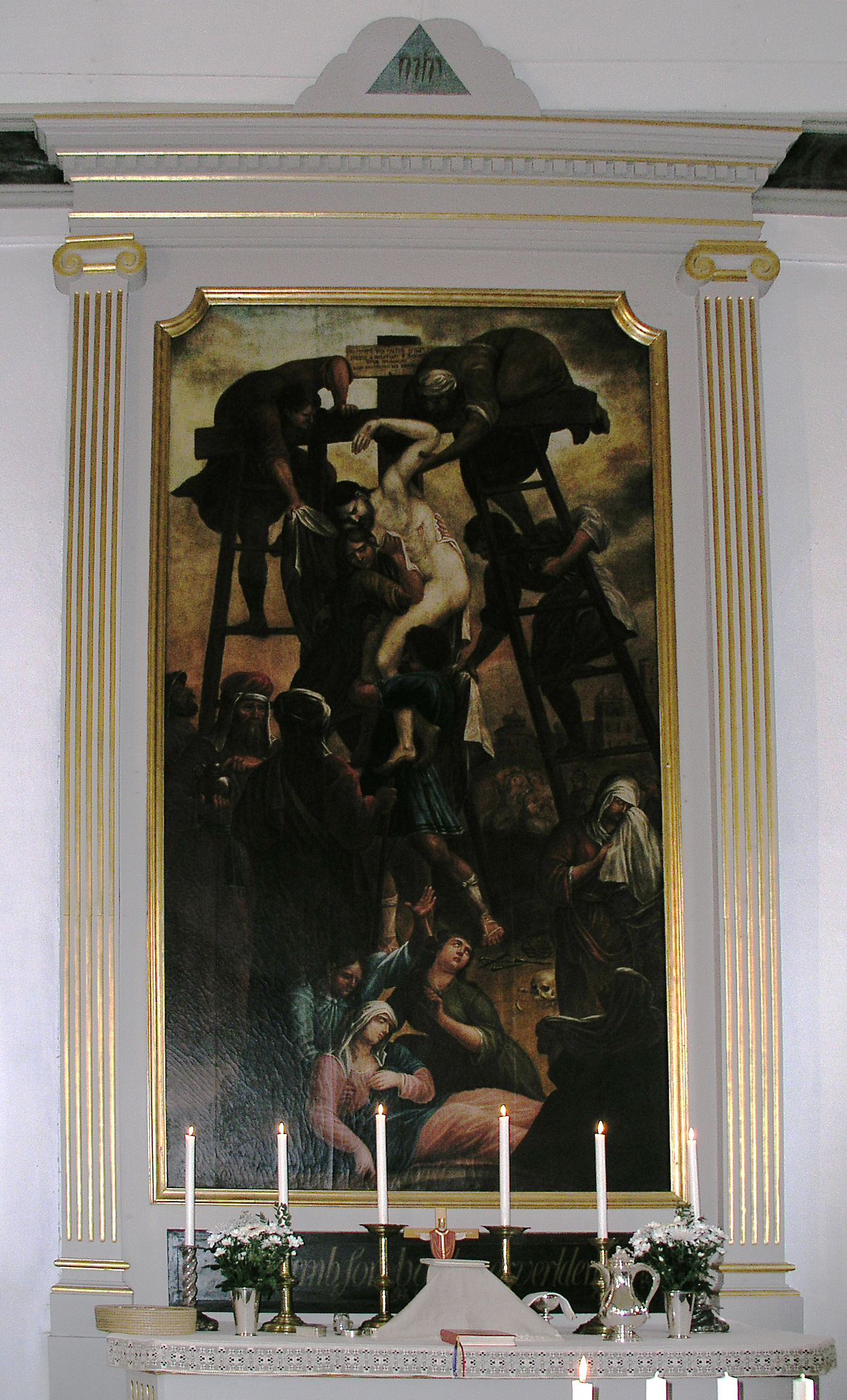 Altar piece, Rystads kyrka, Diocese of Linköping, Linköpings kommun, Sweden